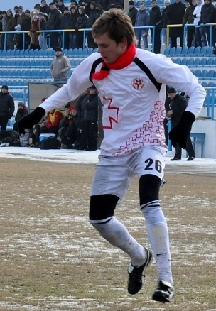 Алексей Бабырь — украинский футболист.